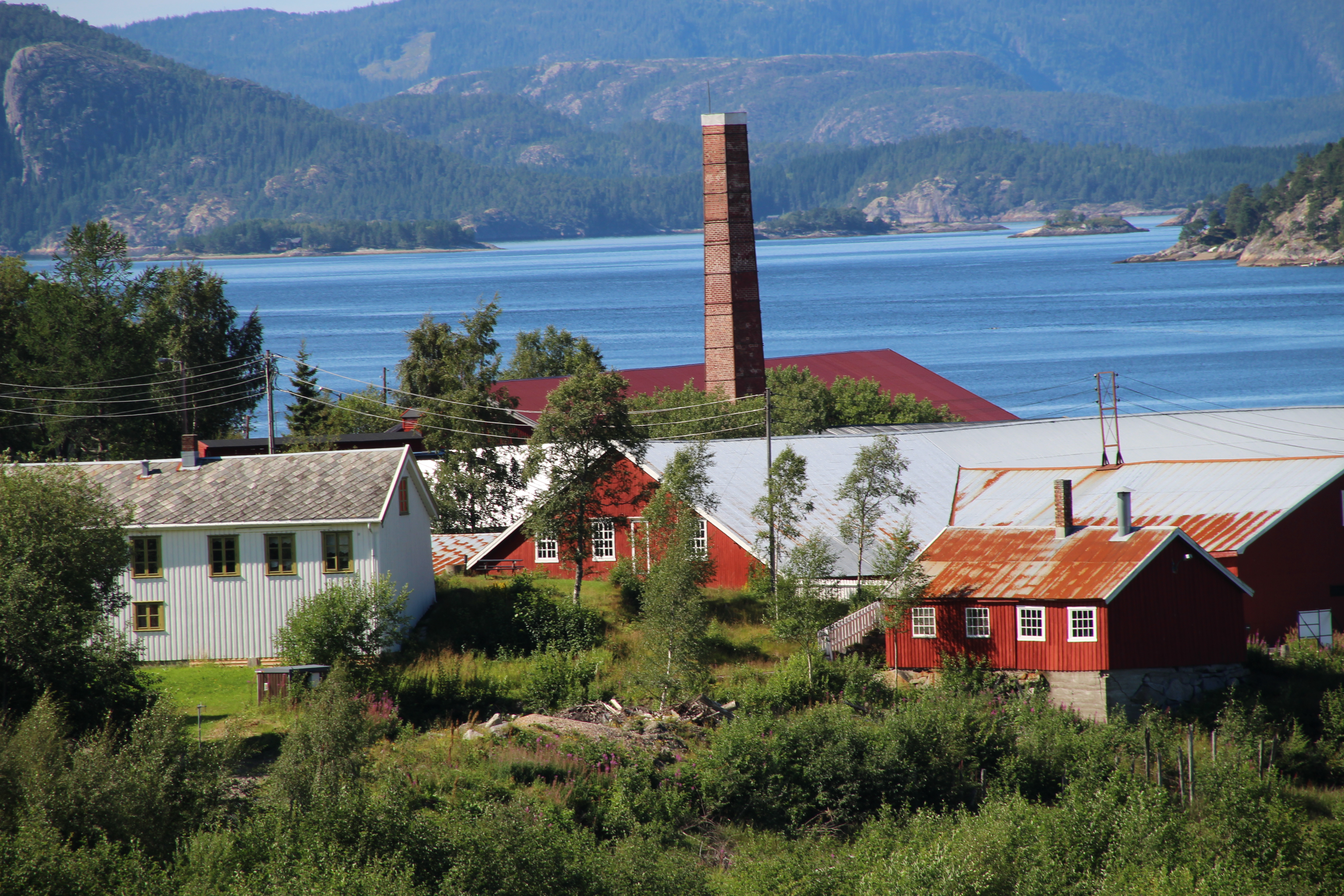 Spillum Dampsag & Høvleri, Norsk Sagbruksmuseum, på Spillum i Namsos kommune i Nord-Trøndelag